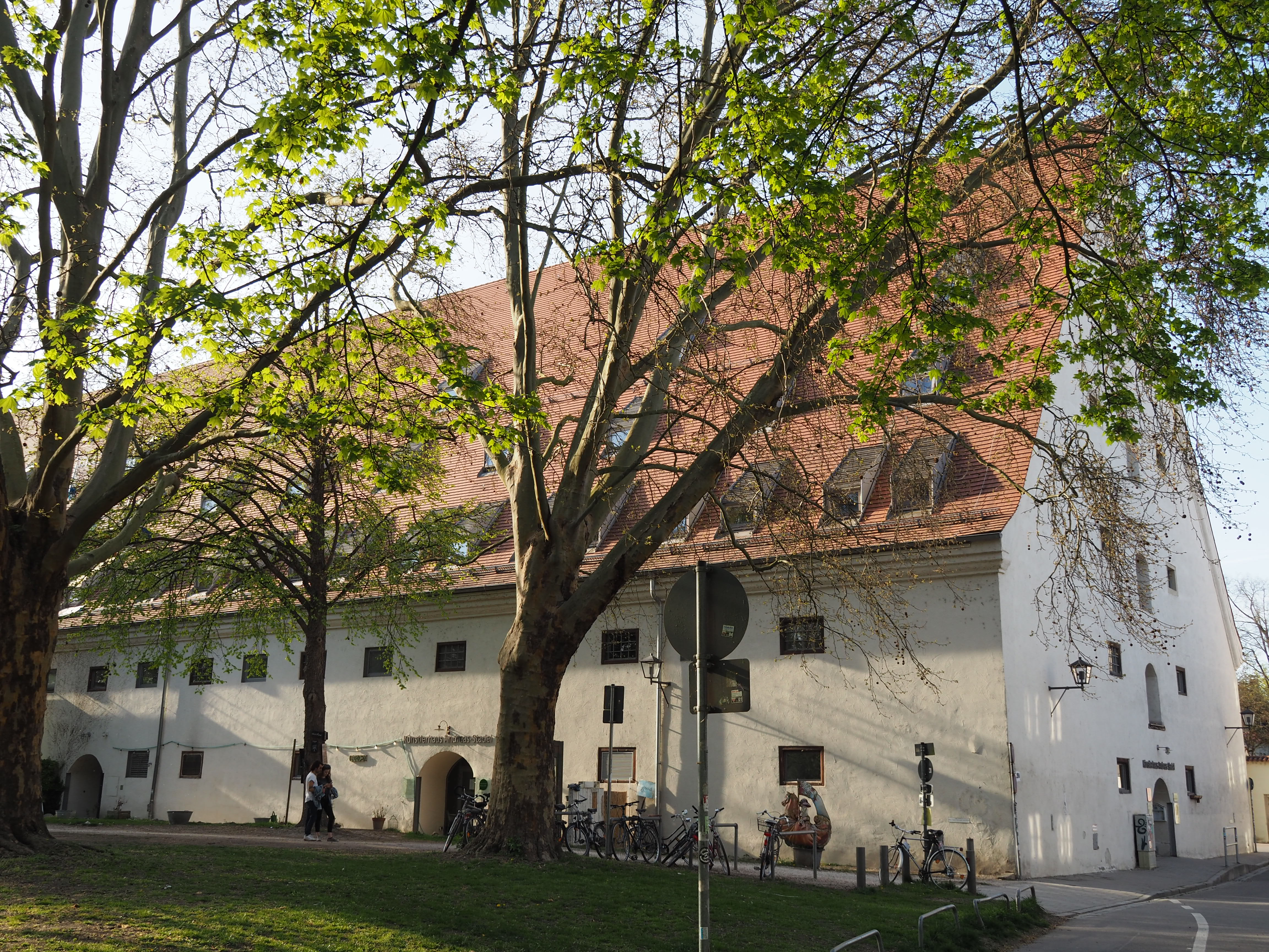 Südseite des Andreasstadels in Regensburg